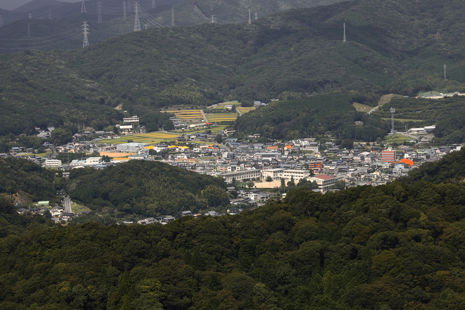 三ヶ根山より望む深溝市街地（額田郡幸田町、2012年）